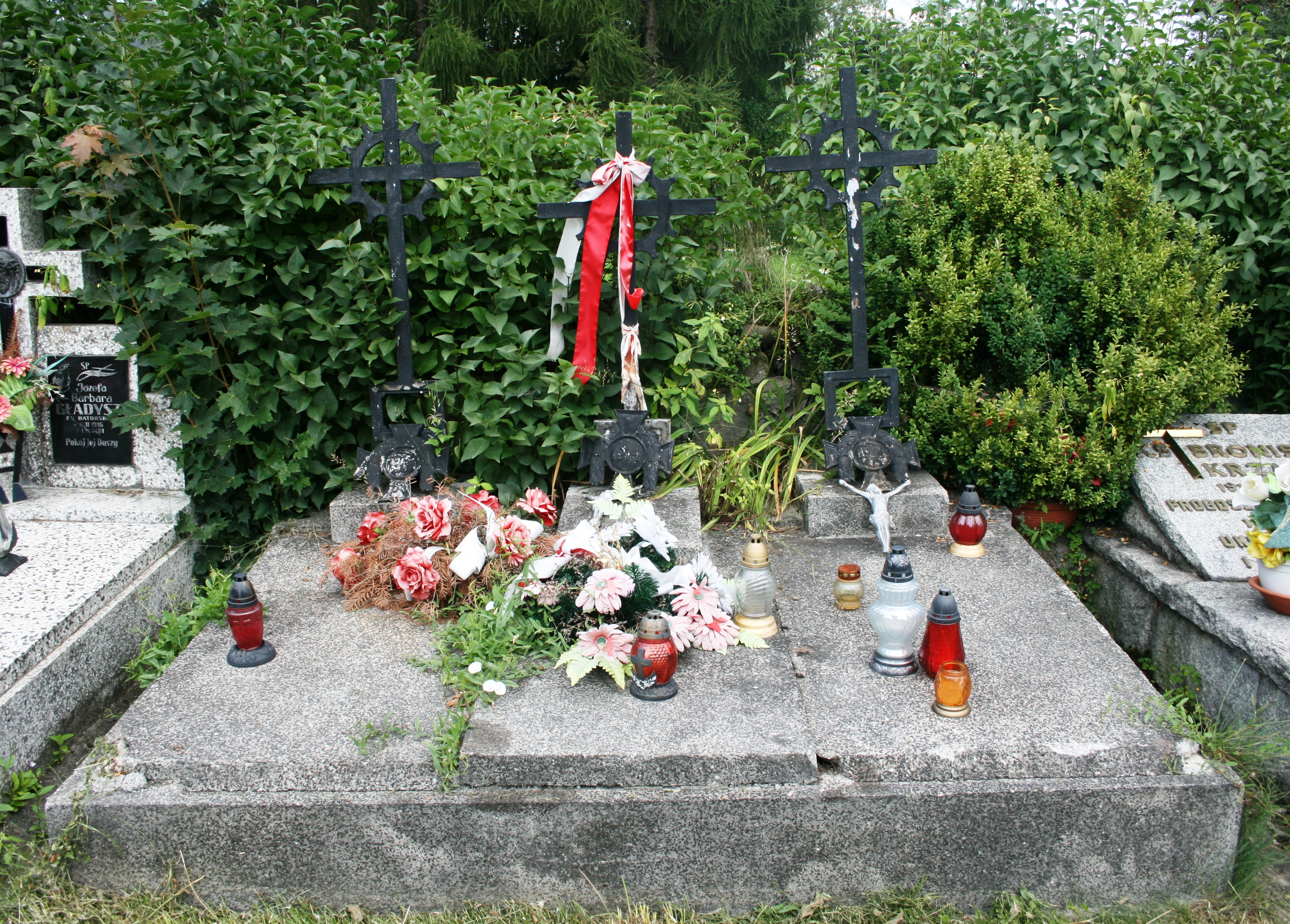 Cmentarz wojenny nr 377 - kwatera na nowym cmentarzu w Krościenku nad Dunajcem